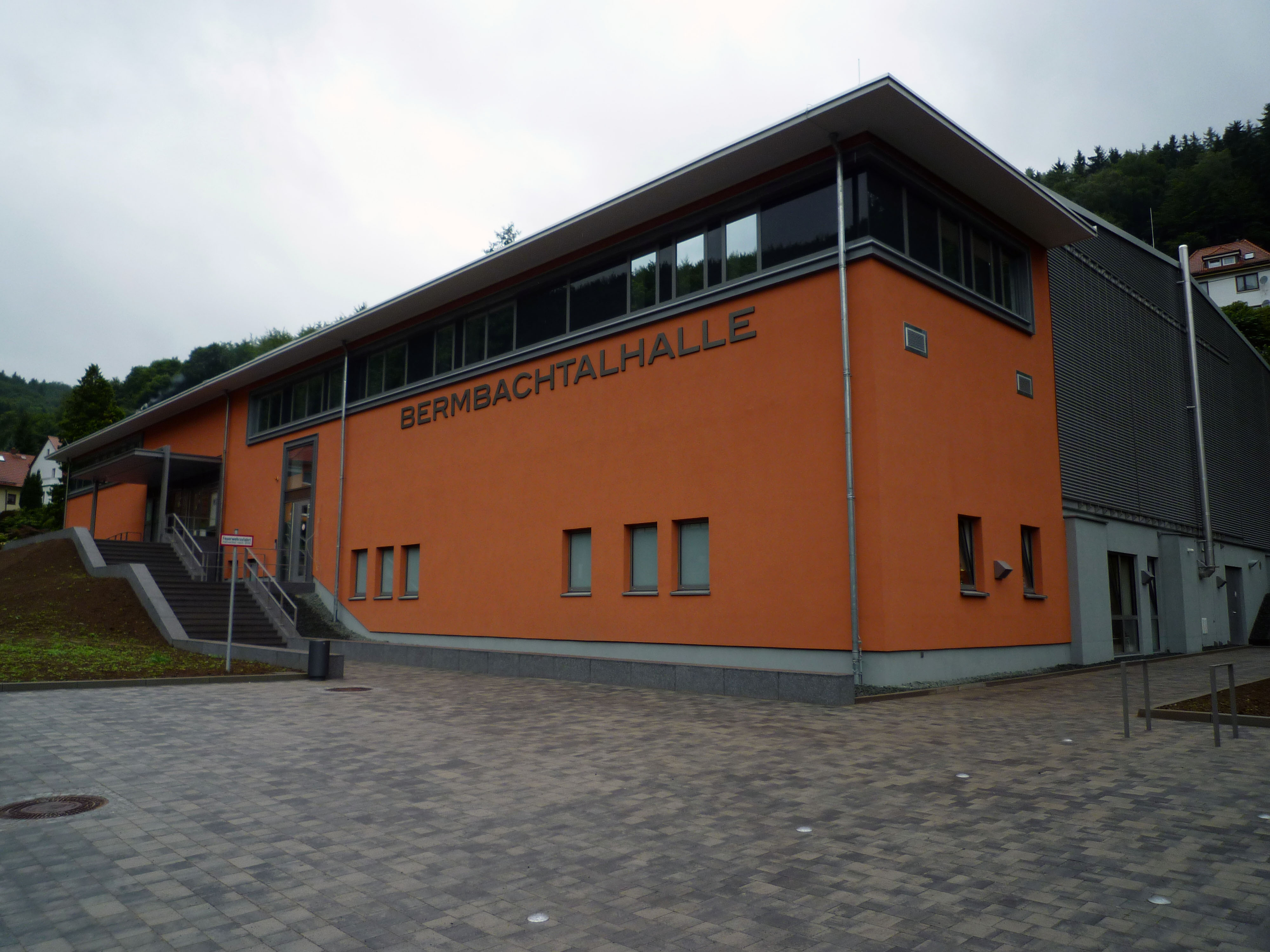 Bermbachtalhalle in Ruhla, Bermbachtal 36